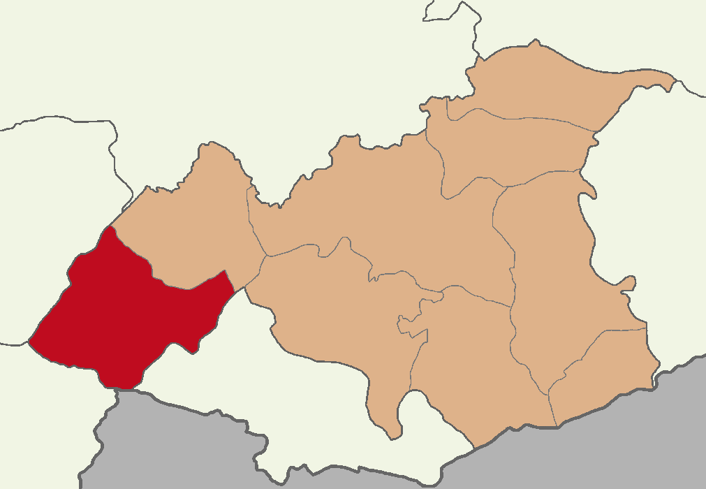 İslahiye ilçesinin konumu